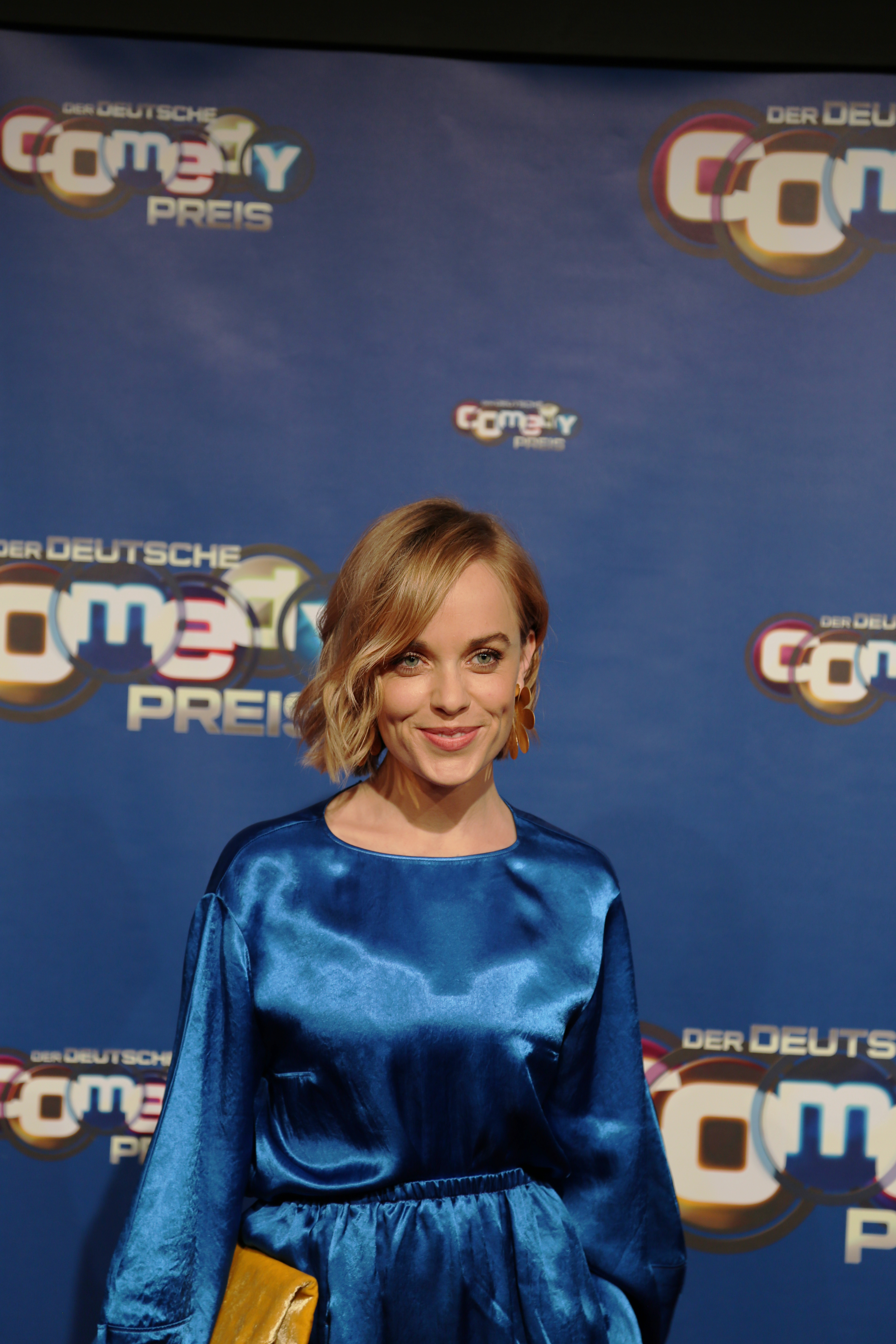 Friederike Kempter beim Deutschen Comedypreis 2017.